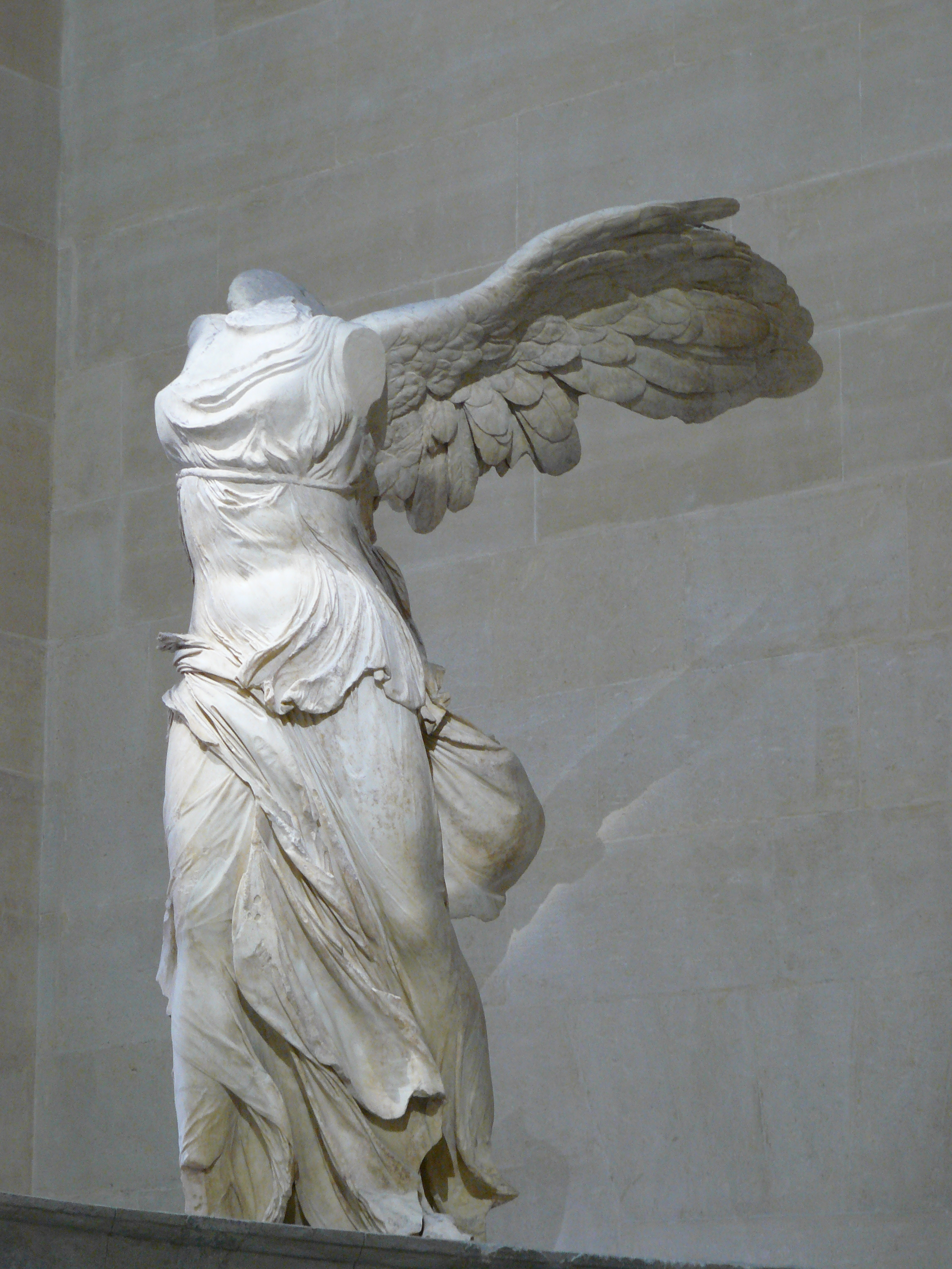 Gros plan de la statue de la victoire.